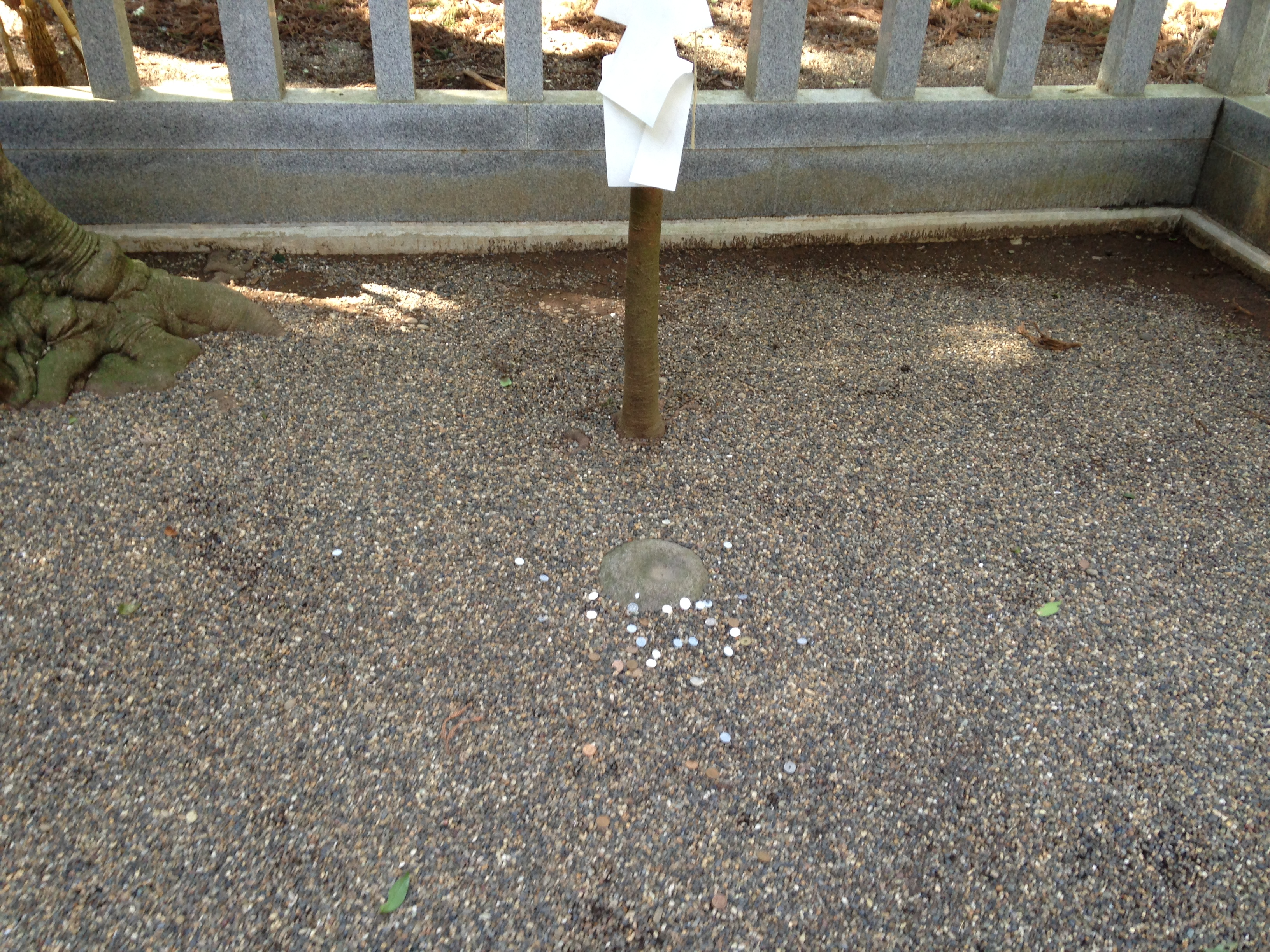 鹿島神宮・要石